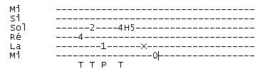 Exemple de tablature (ceci n'est pas un morceau ni même une composition, les notes ayant été choisies au hasard)